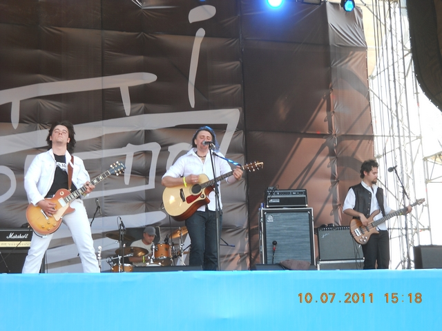 группа Река на Нашествии 2011